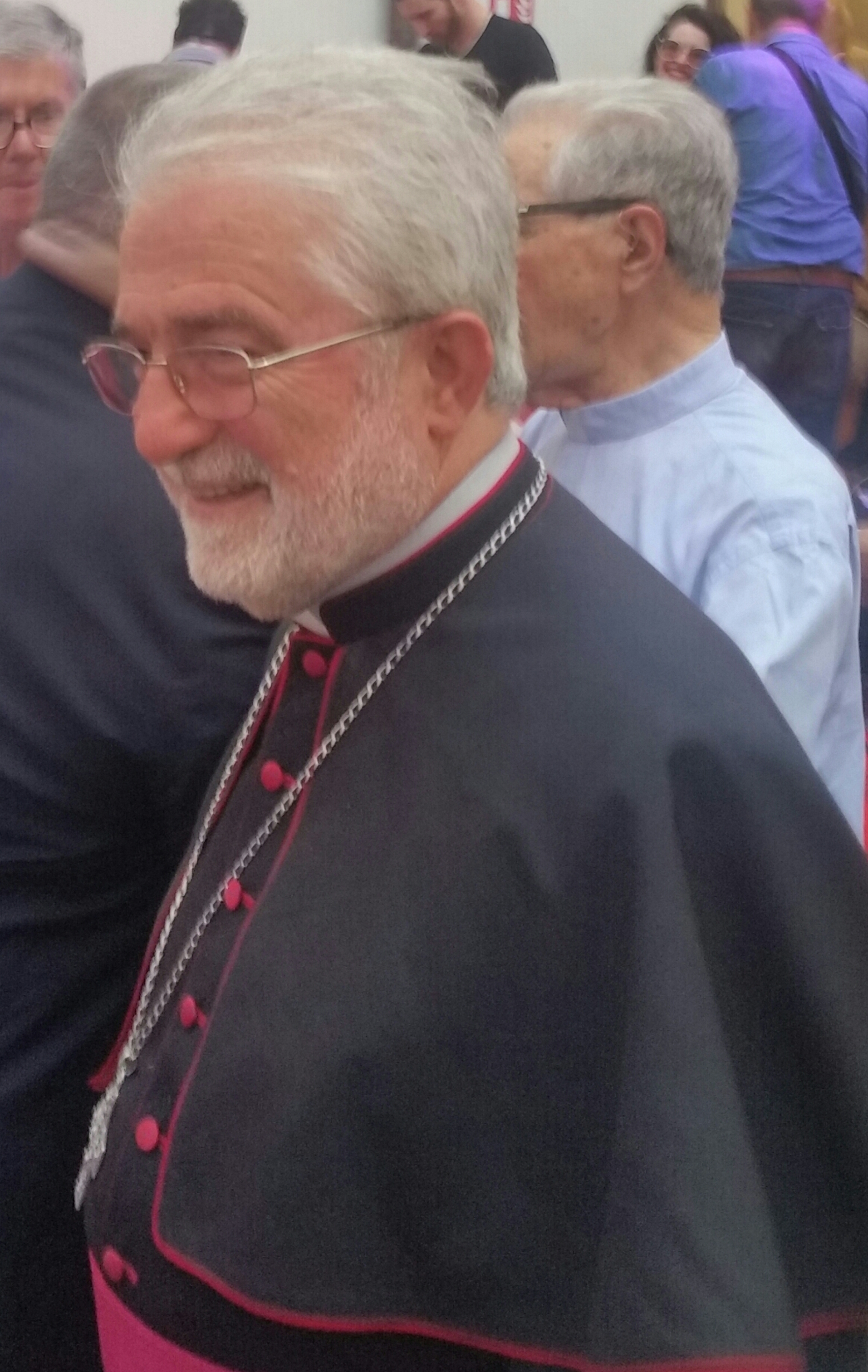 Il vescovo Rodolfo Cetoloni all'inaugurazione della Biblioteca Chelliana (27 giugno 2019)